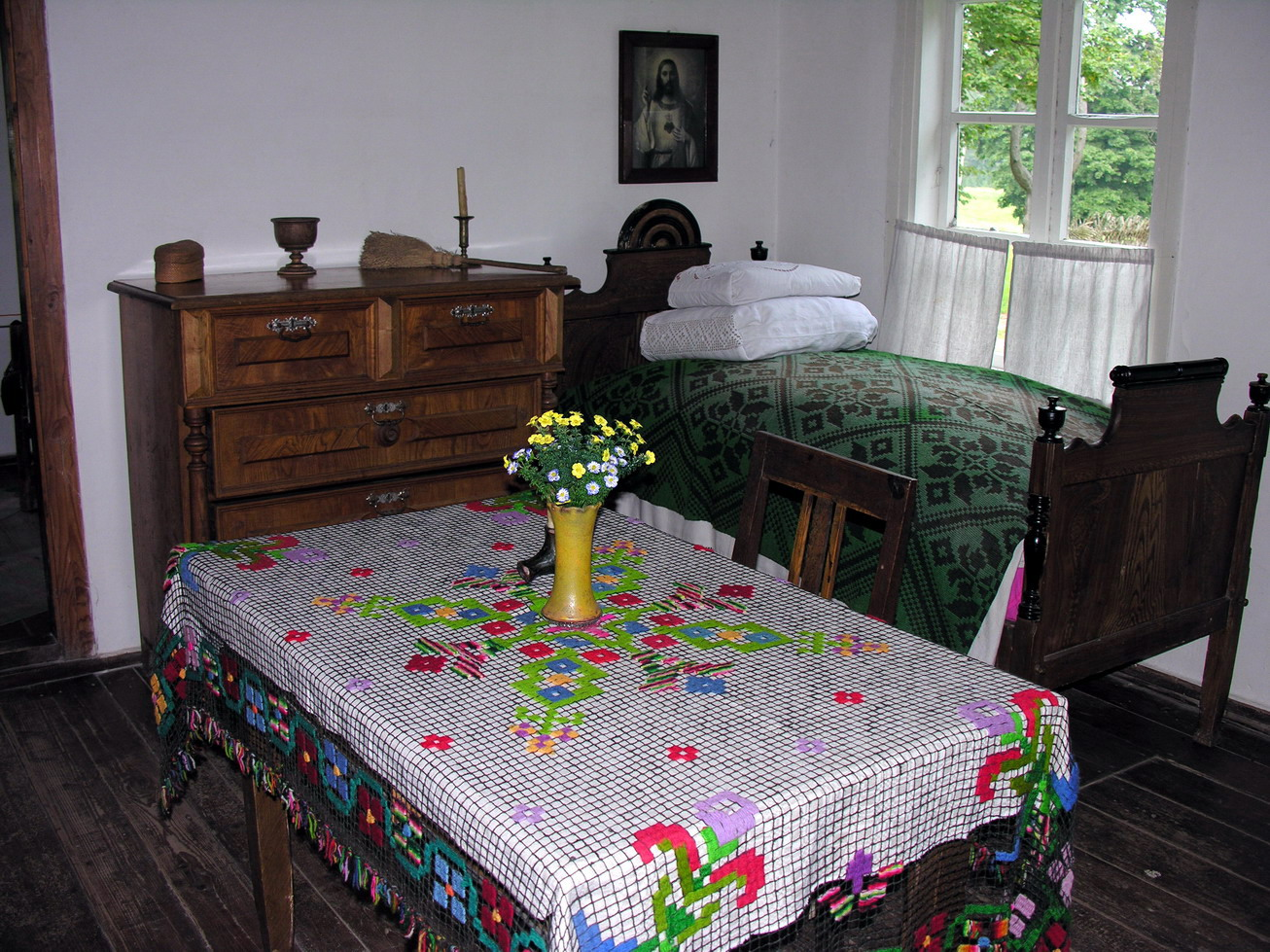 Žemaitėška: Bukante (lt. Bukantė) Rašytuojės Žemaitės gimtėnė (muziejos) Bukantie Žemaitėjės naciuonalėnis parks Puortegrapėje Algirda, 2007-08-23, Žemaitėjė